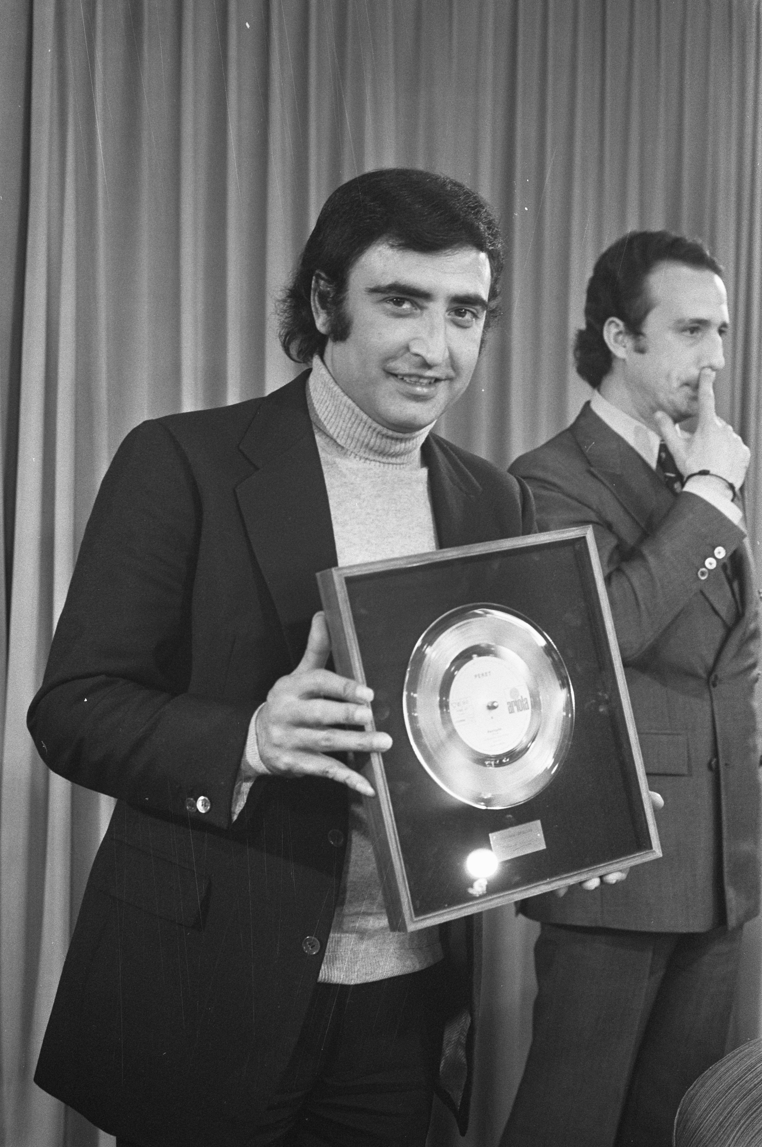 Collectie / Archief : Fotocollectie Anefo Reportage / Serie : [ onbekend ] Beschrijving : Aankomst Spaanse zanger Peret op Schiphol, Peret met gouden plaat Annotatie : Gouden plaat was voor zijn hit "Borriquito" Datum : 17 november 1971 Locatie : Noord-Holland, Schiphol Trefwoorden : aankomsten, zangers Persoonsnaam : Peret Fotograaf : Verhoeff, Bert / Anefo, [onbekend] Auteursrechthebbende : Nationaal Archief Materiaalsoort : Negatief (zwart/wit) Nummer archiefinventaris : bekijk toegang 2.24.01.05 Bestanddeelnummer : 925-1522